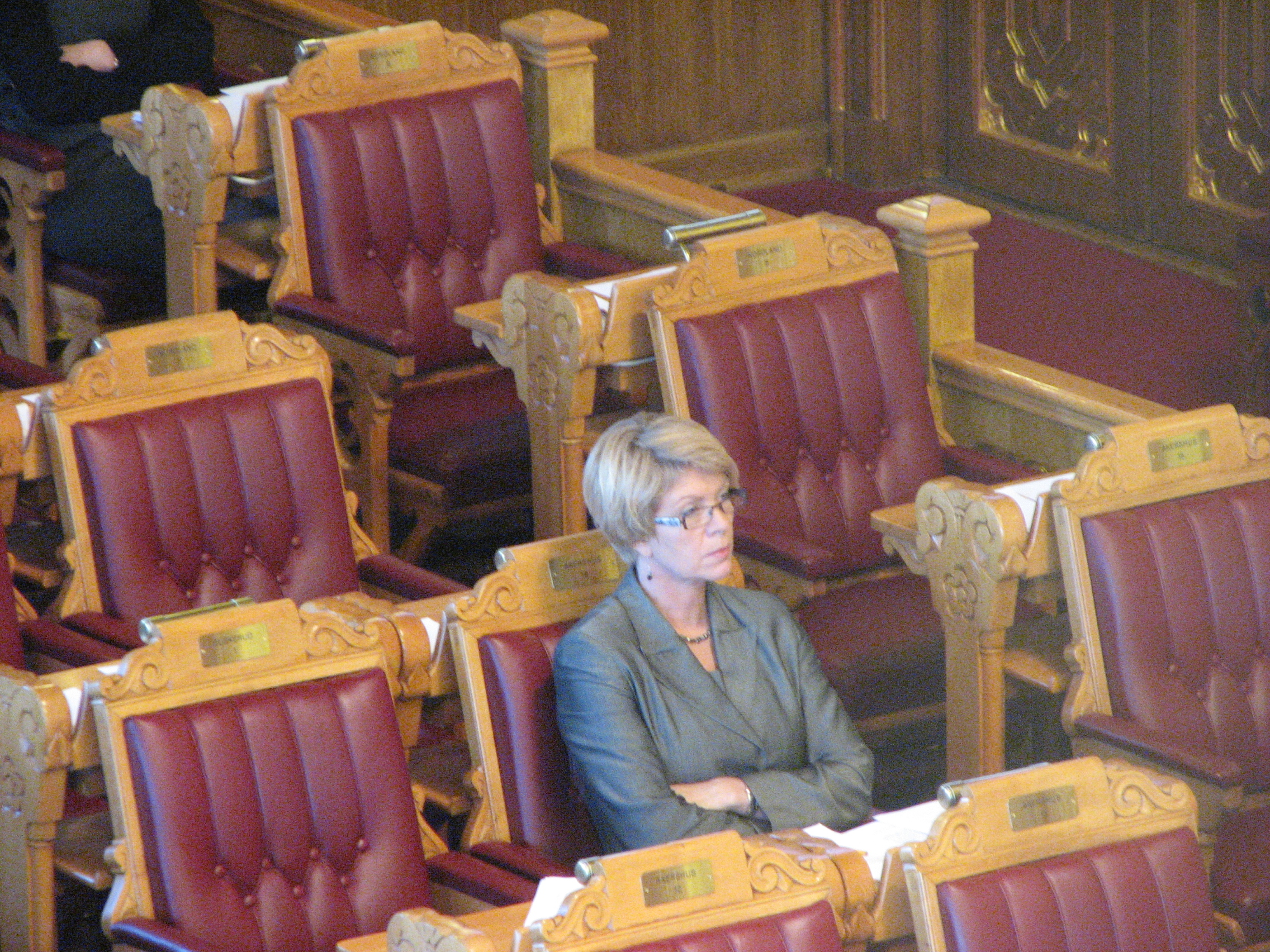 Stortingsrepresentant Åslaug Haga for Akershus Senterparti i Stortinget 12. februar 2009.